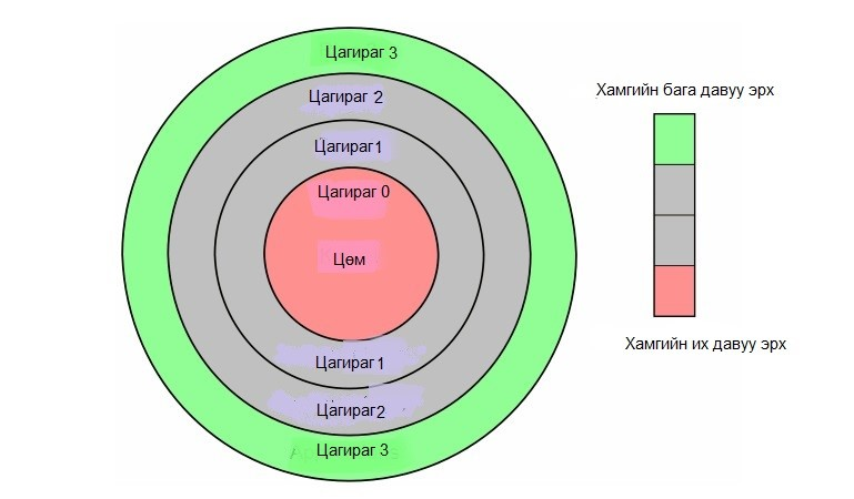 Монгол: Kernel mode(цөмийн горим)хамгаалах 4 цагираг